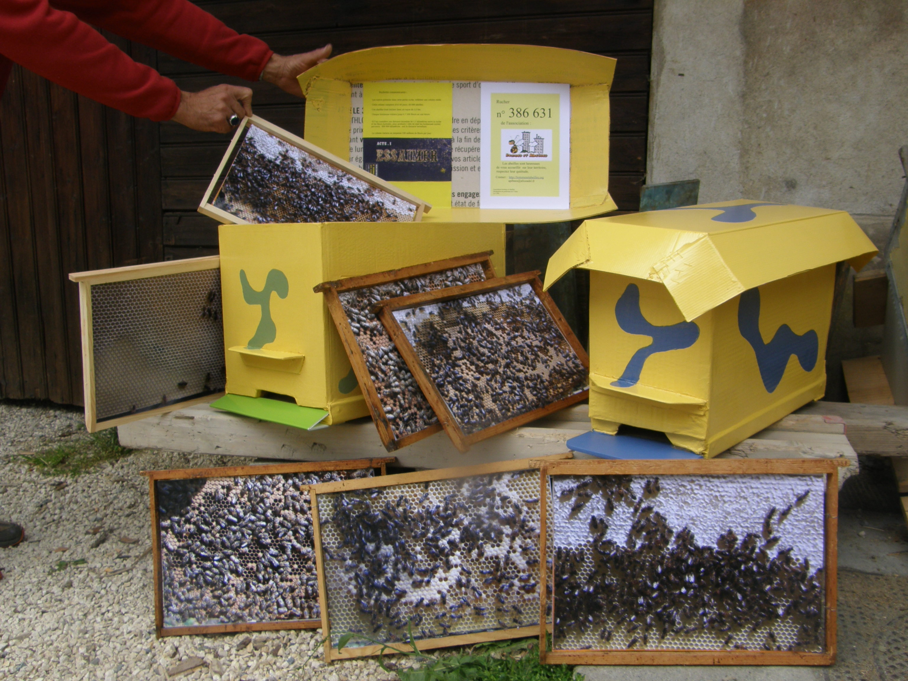 Les adhérents d'hommes et abeilles construisent des ruches pédagogiques, qui sont utilisées par des enseignants ou des musées, écoles d'apiculture. ces ruches sont en carton de récupération.